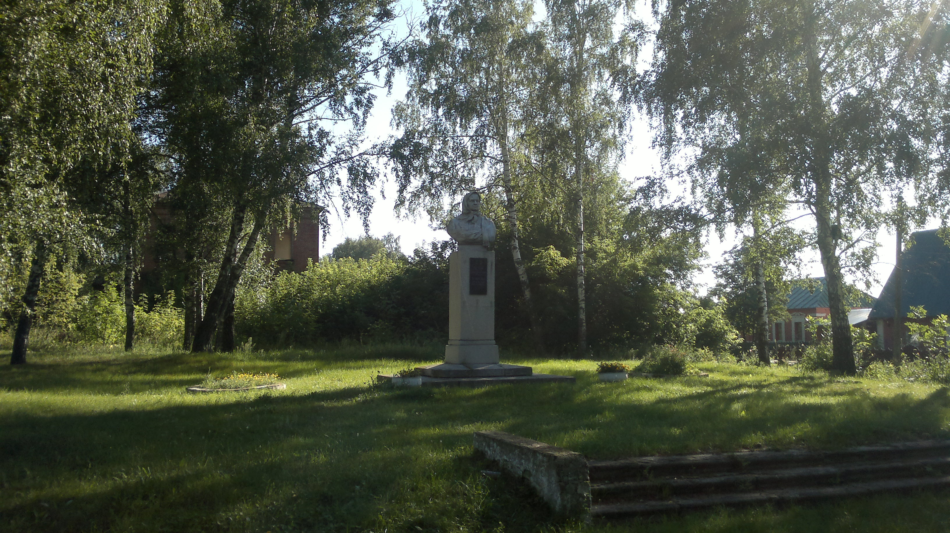 Бюст дважды героя социалистического труда П.Н. Ковровой: Юшта, Шиловский район, Рязанская область